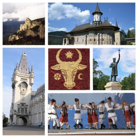 Colaj Moldova, toate fotografiile sunt de pe wikipedia